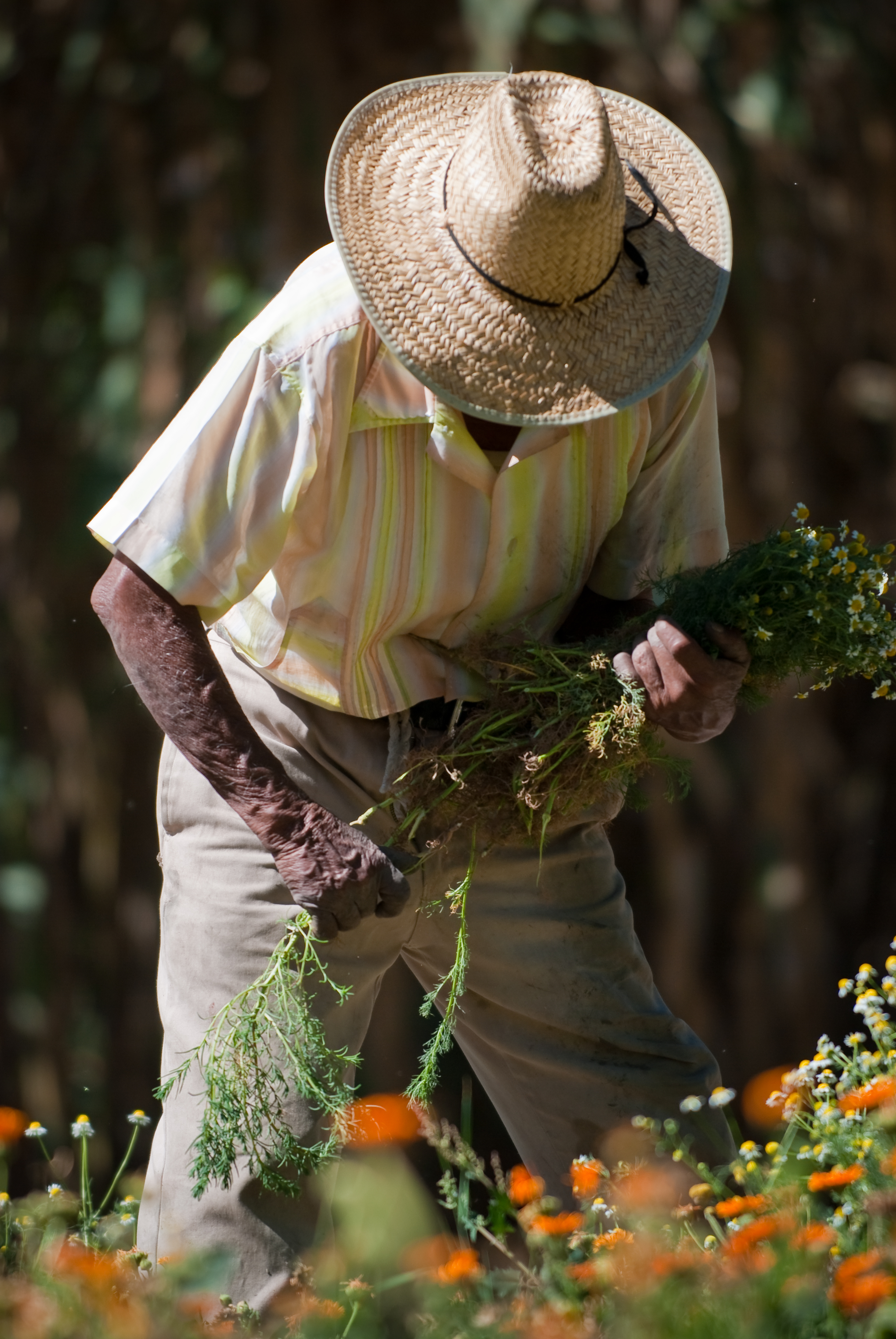 Y me permito citar algo del Movimiento de Trabajadores del Campo Sin Tierra de Brasil (Movimento dos Trabalhadores Rurais Sem Terra) para demostrar que, en toda latinoamérica, la exigencia sigue siendo la misma (despues de tantos años): "A nação, por meio do Estado, do governo, das leis e da organização de seu povo deve zelar permanentemente, pela soberania, pelo patrimônio coletivo e pela sanidade ambiental. É preciso realizar uma ampla Reforma Agrária, com caráter popular, para garantir acesso à terra para todos os que nela trabalham. Garantir a posse e uso de todas as comunidades originárias, dos povos indígenas, ribeirinhos, seringueiros, geraiszeiros e quilombolas. Estabelecer um limite máximo ao tamanho da propriedade de terra, como forma de garantir sua utilização social e racional. É preciso organizar a produção agrícola nacional tendo como objetivo principal a produção de alimentos saudáveis, livres de agrotóxicos e organismos geneticamente modificados (transgênicos) para toda a população, aplicando assim o princípio da soberania alimentar. A política de exportação de produtos agrícolas deve ser apenas complementar, buscando maior valor agregado possível e evitando a exportação de matérias-primas." ENTRE LAS FUNCIONES PRIMORDIALES DEL ESTADO ESTÁN LAS DE RESGUARDAR LA SOBERANÍA, VER POR EL PATRIMONIO COLECTIVO Y EL CUIDADO AL MEDIO AMBIENTE. Campesino trabajando su chinampa en Xochimilco, Ciudad de México